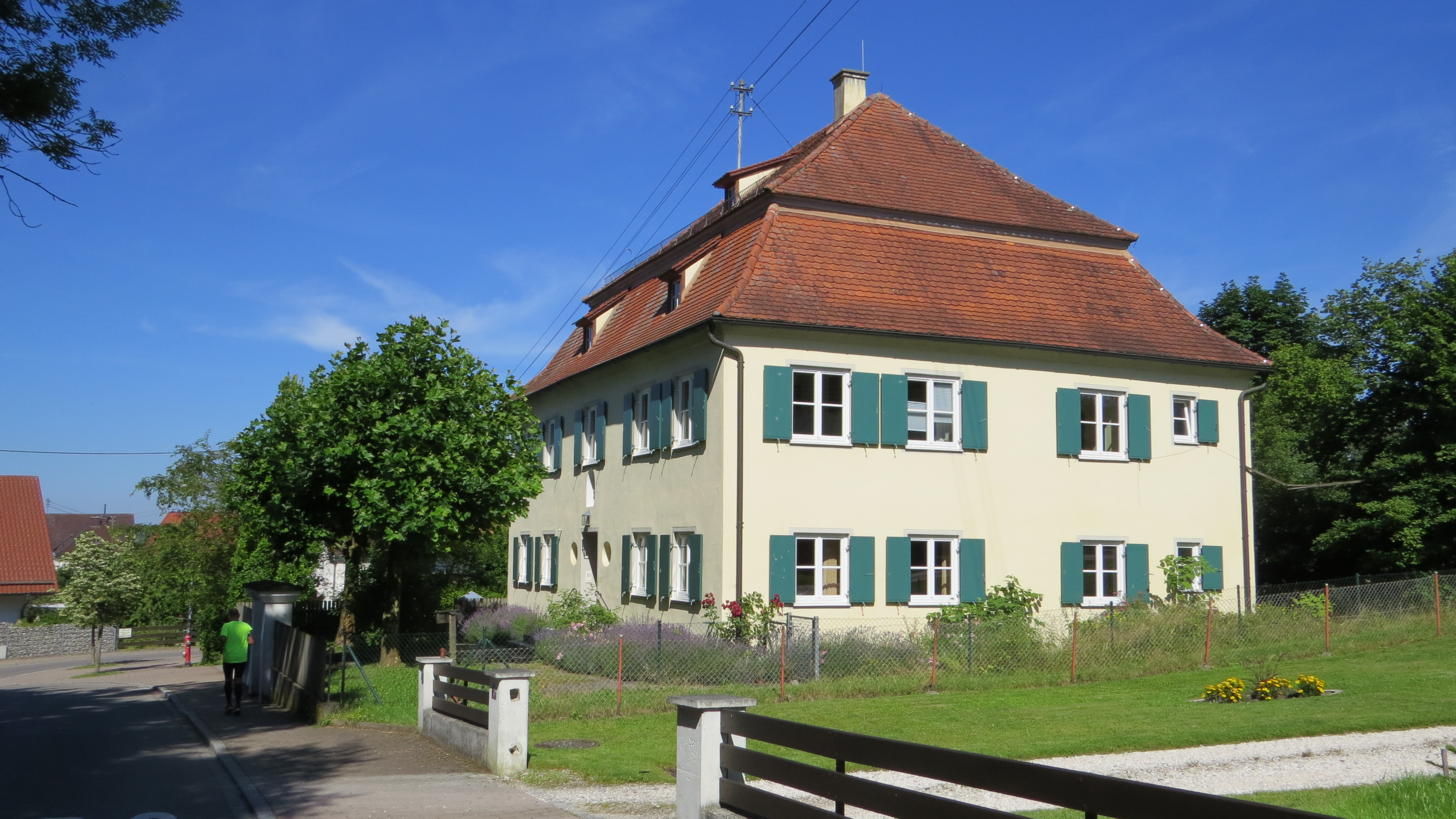 Pfarrhaus in Herrenstetten, Altenstadt (Iller)